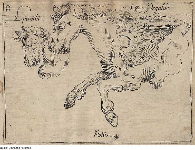 Original image description from the Deutsche Fotothek Astronomie & Sternbild